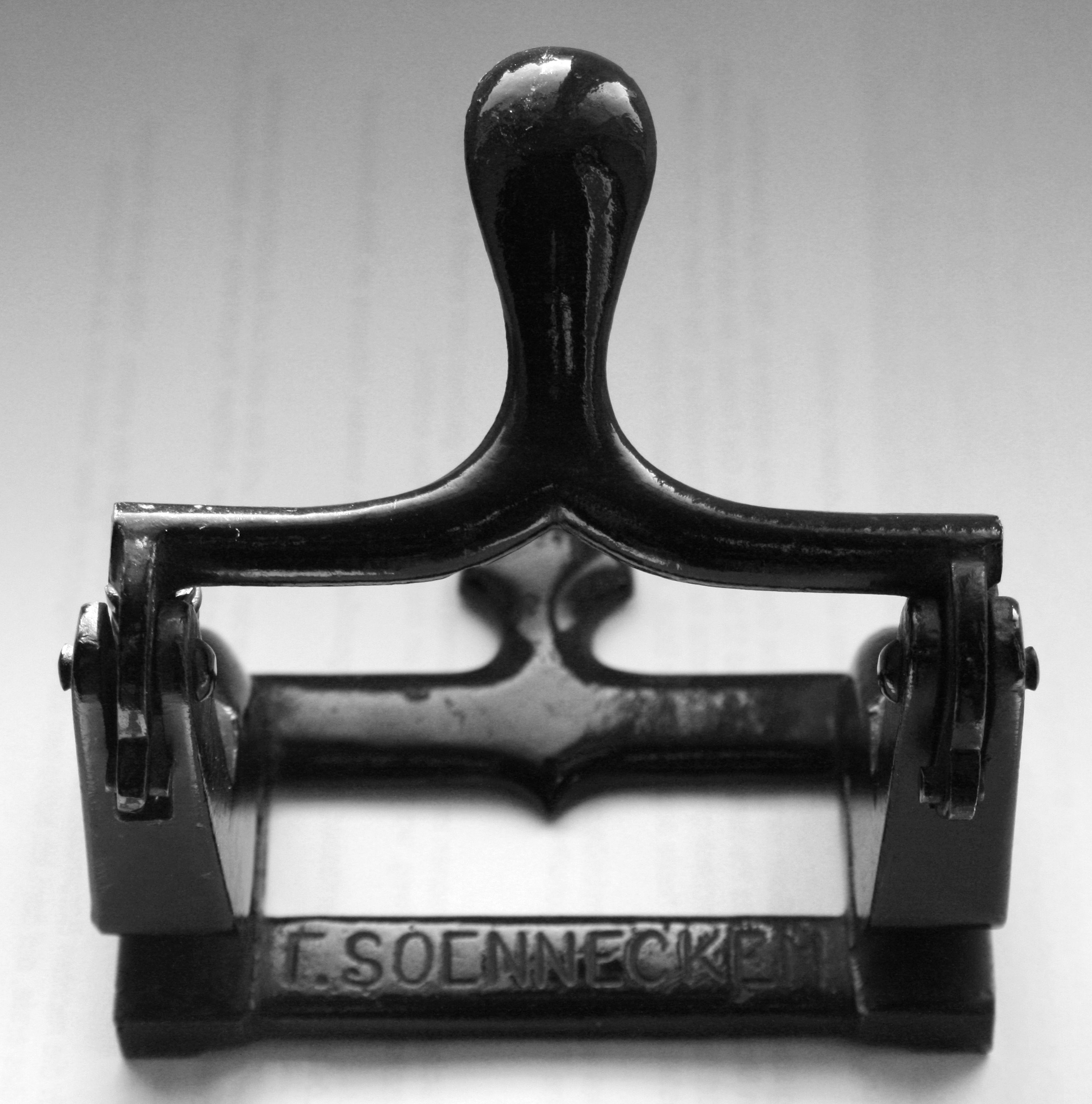 Locher des Unternehmens Soennecken von 1888